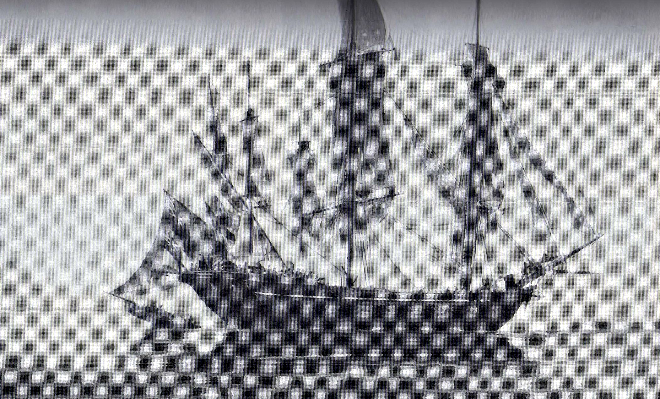 Combat du brick anglais le Speedy, commandé par Thomas Cochrane, contre la frégate espagnole gréée en chebec Gamo.